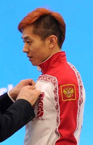 Орденом «За заслуги перед Отечеством» четвёртой степени награждён трёхкратный олимпийский чемпион и бронзовый призёр олимпийских игр в шорт-треке Виктор Ан.